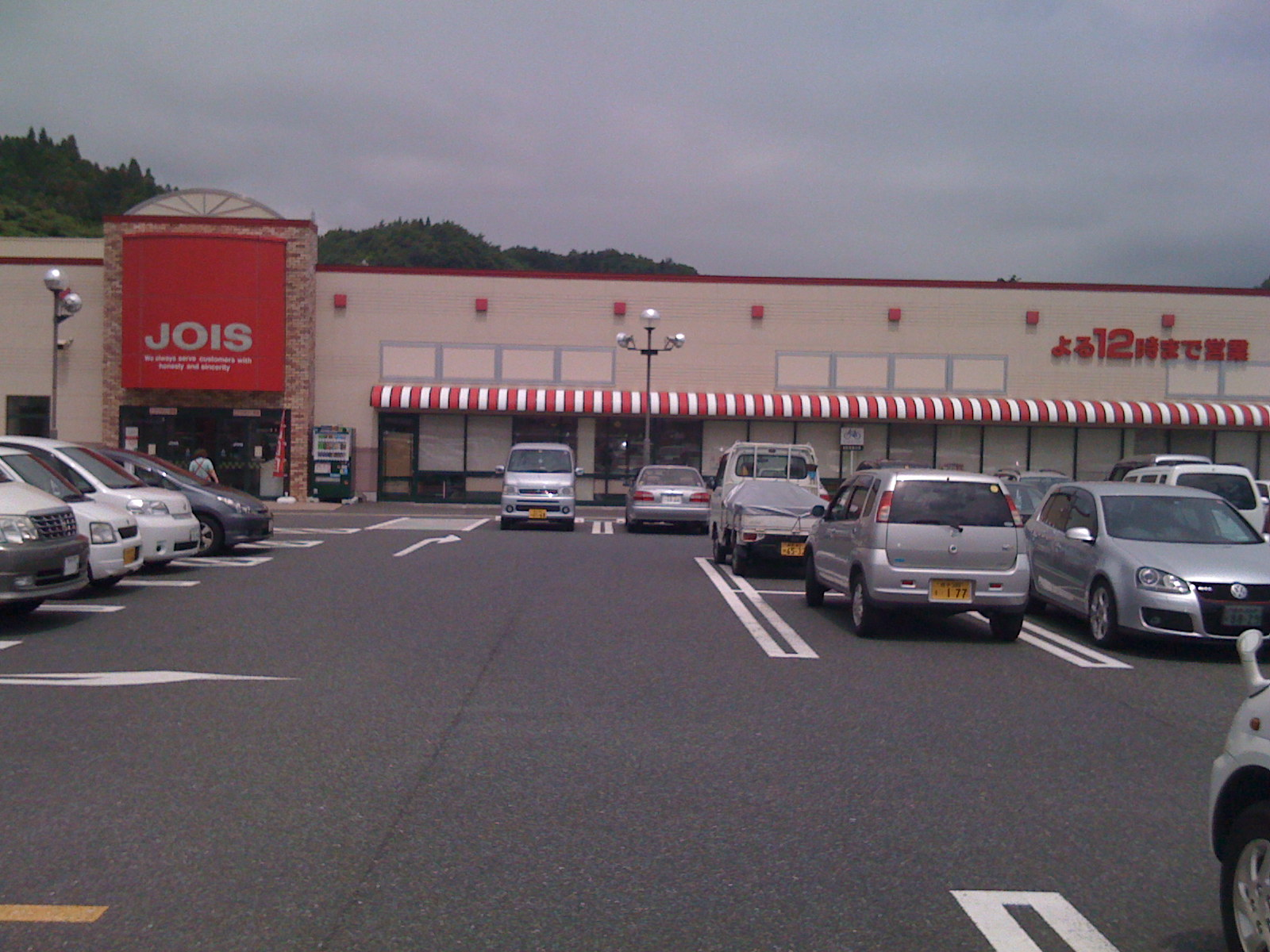 ジョイス宮古千徳店。2008年7月、宮古市板屋にて撮影。